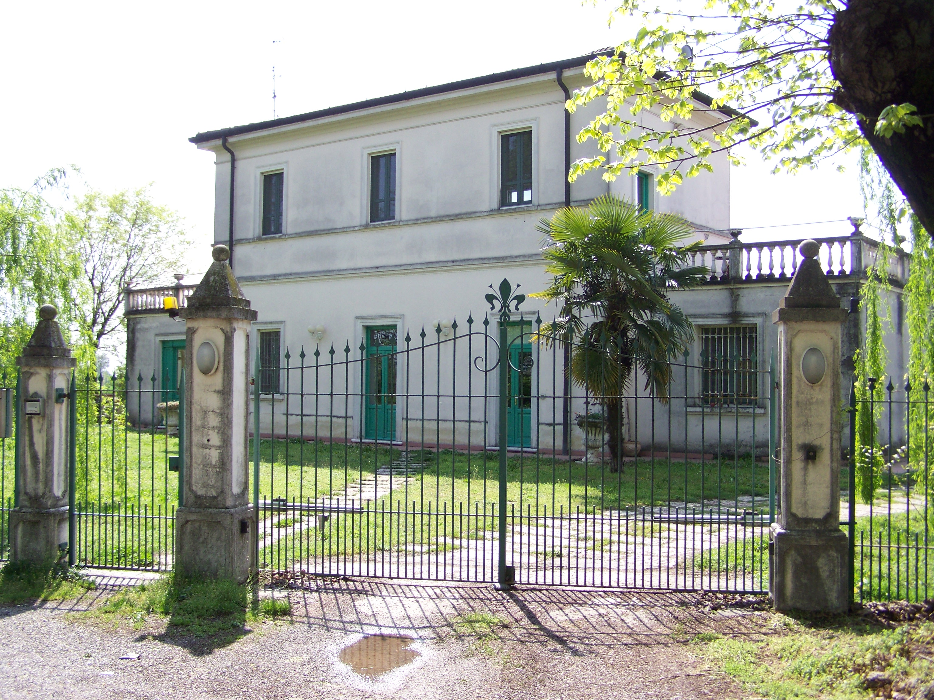 Lato campagna del fabbricato viaggiatori della stazione di Trenzano-Cossirano sulla dismessa ferrovia Cremona-Iseo.